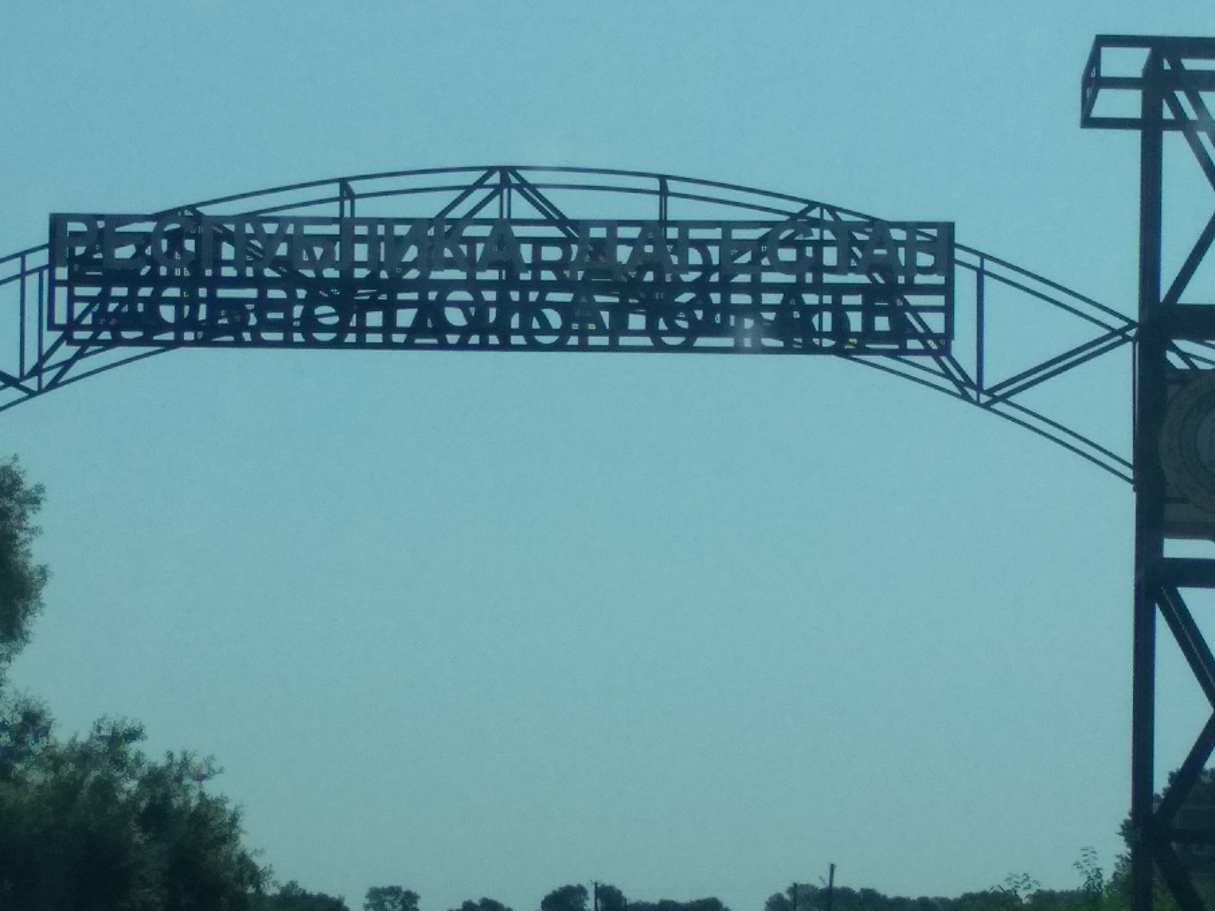 Нохчийн: Нохчийчоьнан а, Дег\астанан а доза